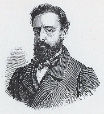 Stefano Romeo